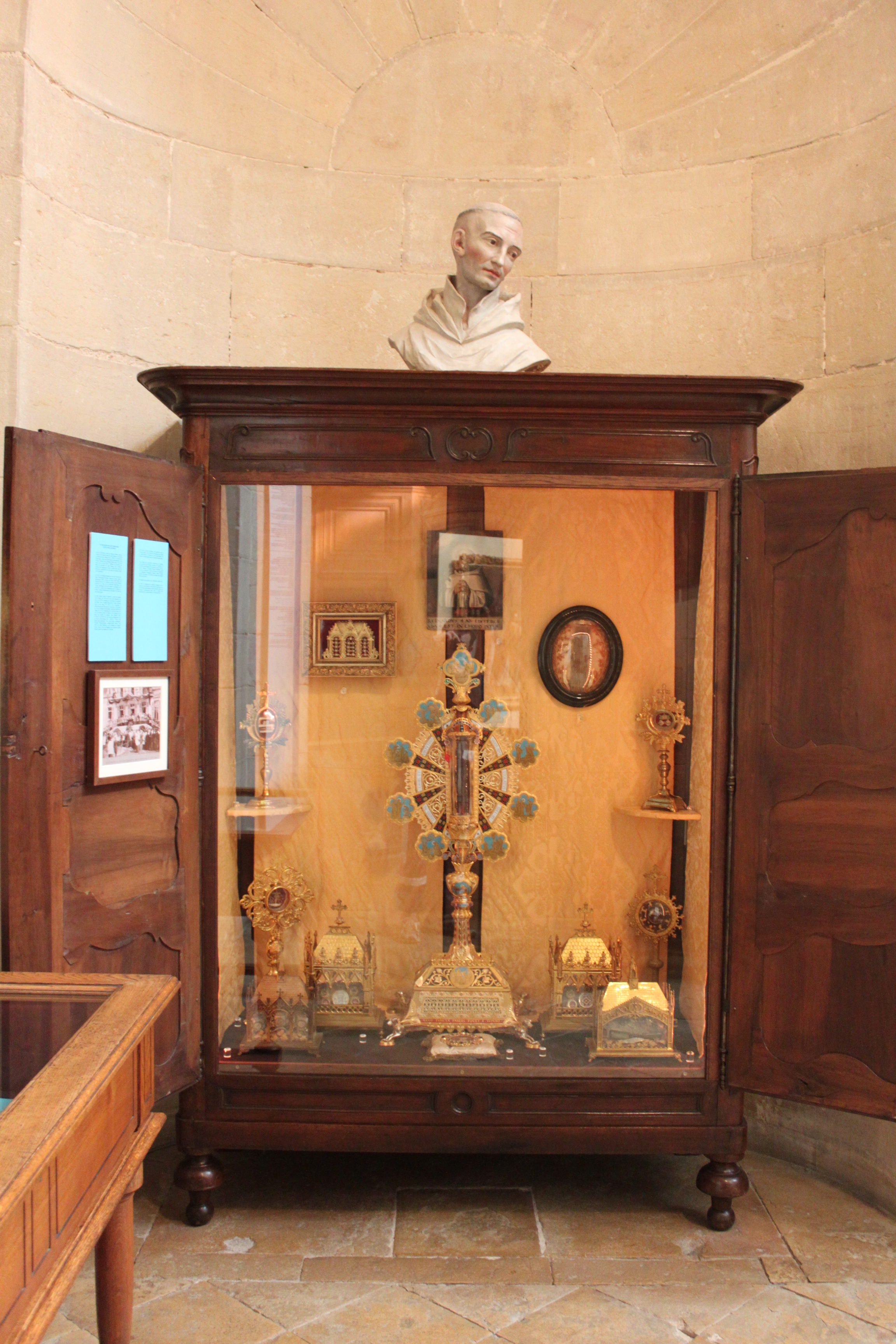 Armoire des reliques de Saint Bernard, Musée d'art sacré de Dijon, Dijon, Côte-d'Or, Bourgogne, FRANCE